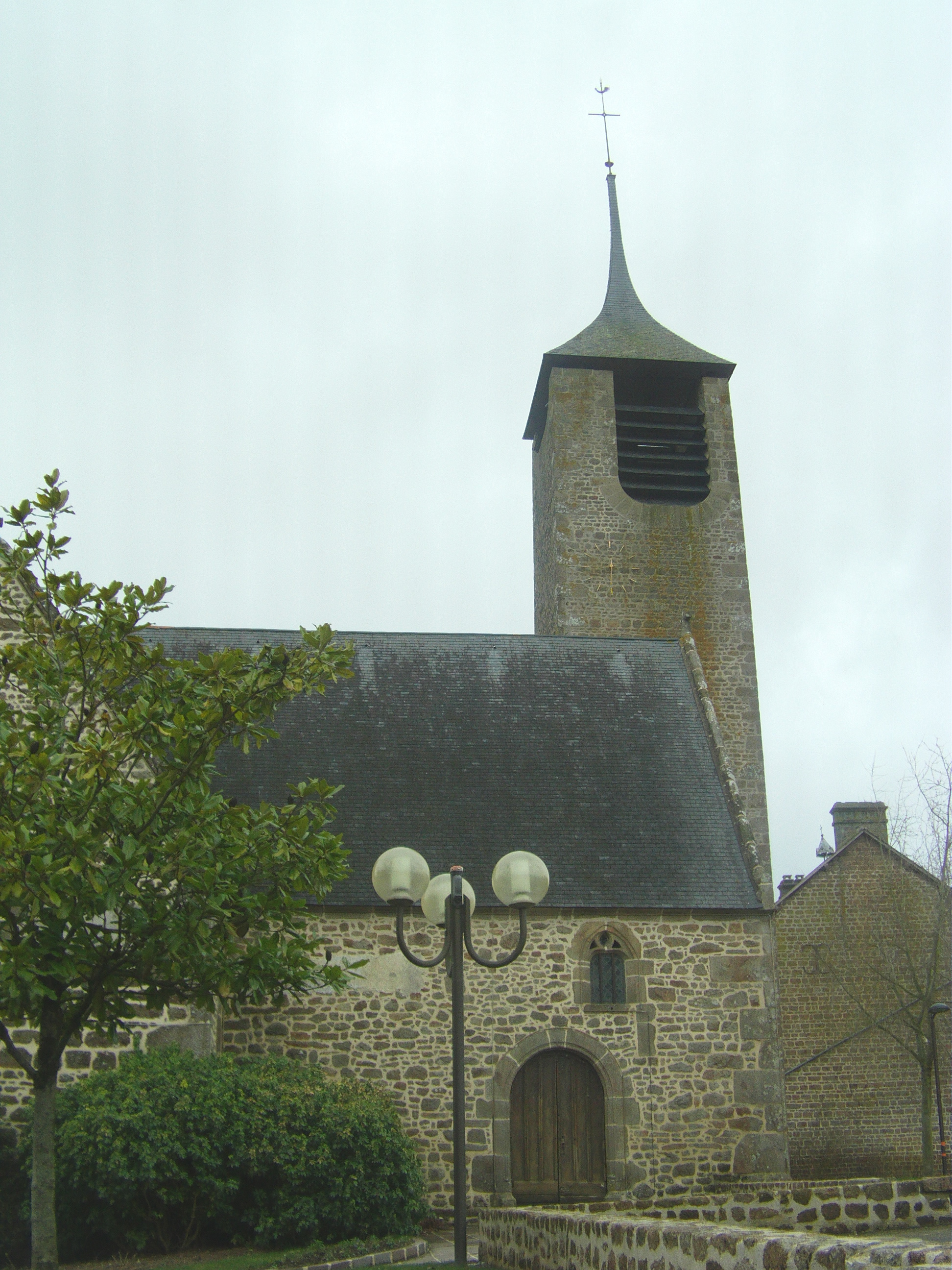 L'église de Chantrigné (Mayenne).